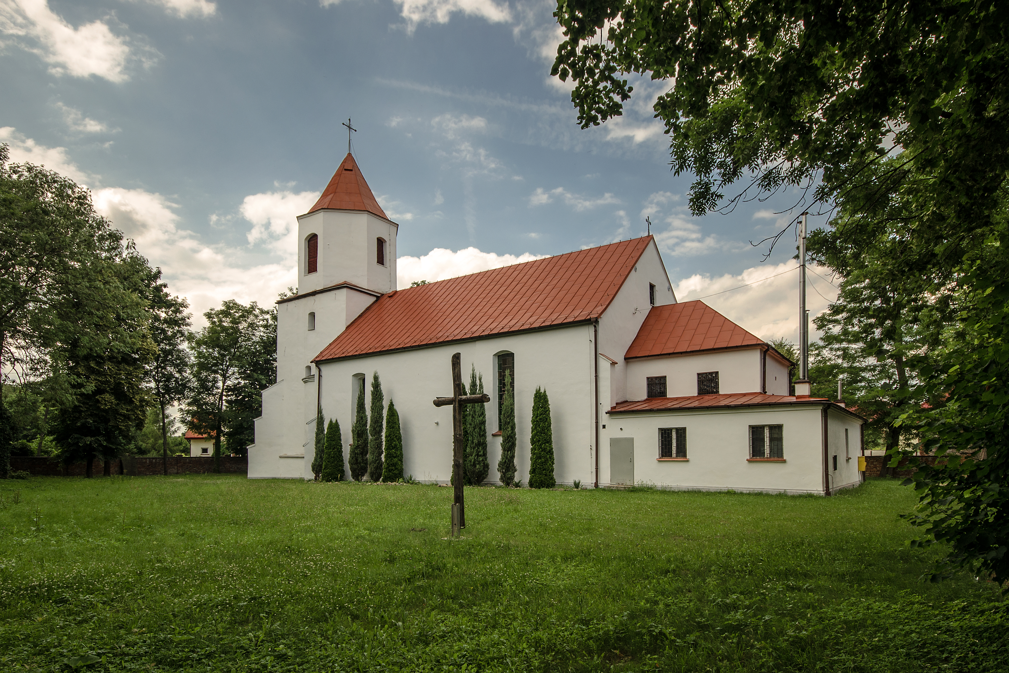 Obora - zespół kościoła fil. p.w. św. Antoniego